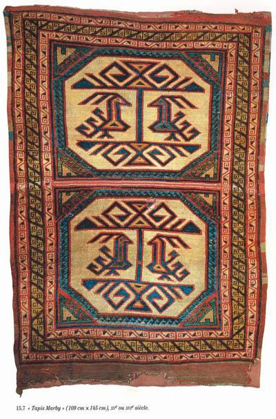 армянский ковер